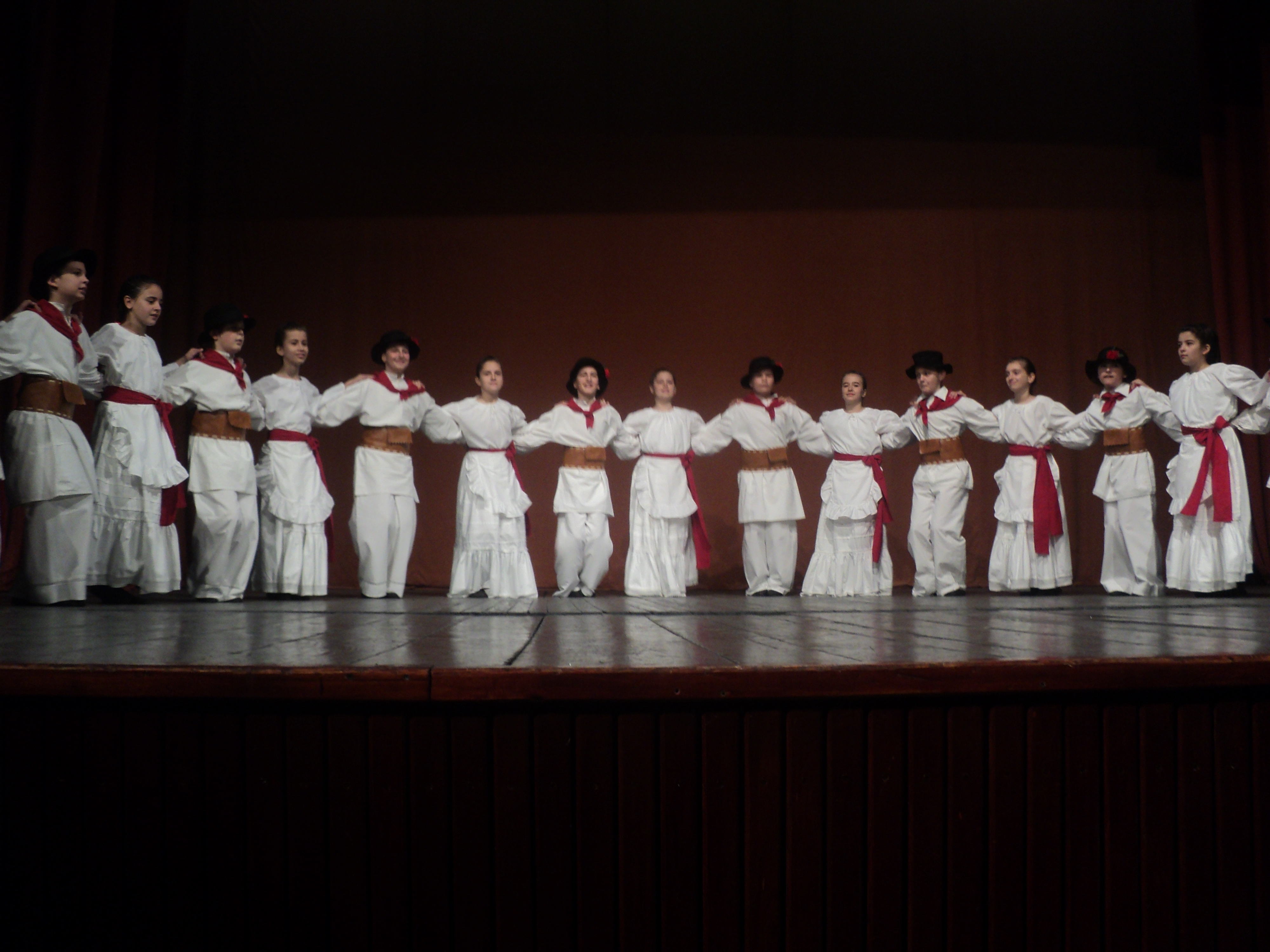 Opštinska smotra Stara Pazova